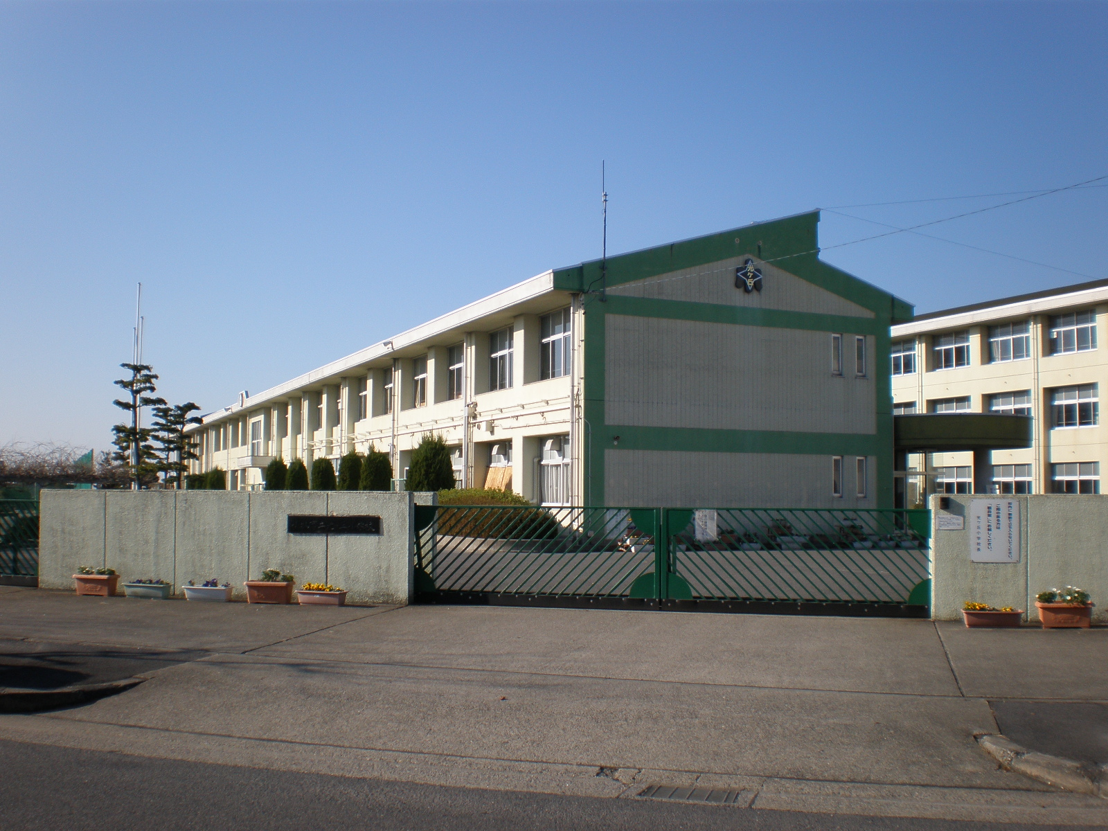 愛知県小牧市にある光ヶ丘小学校